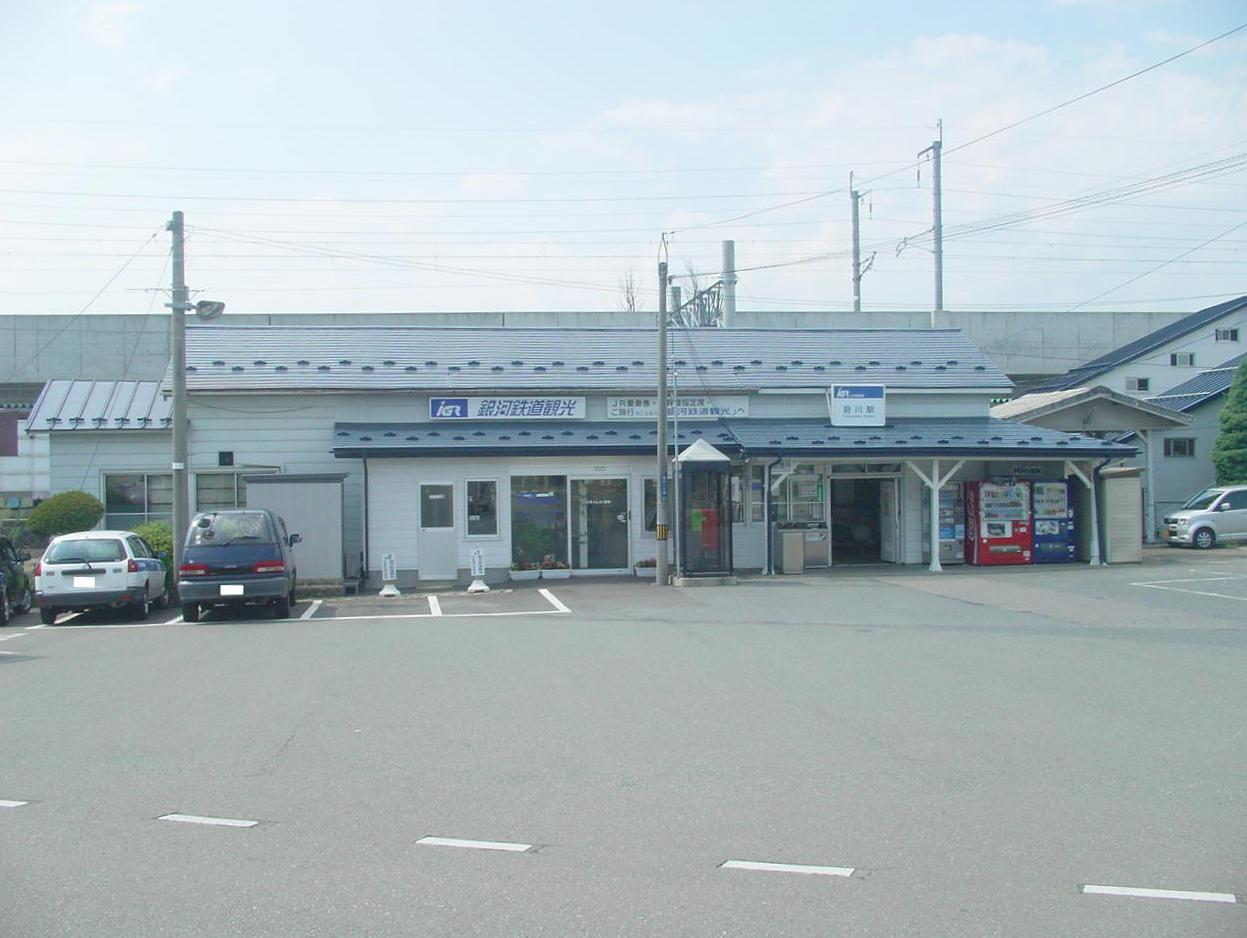 （厨川駅）